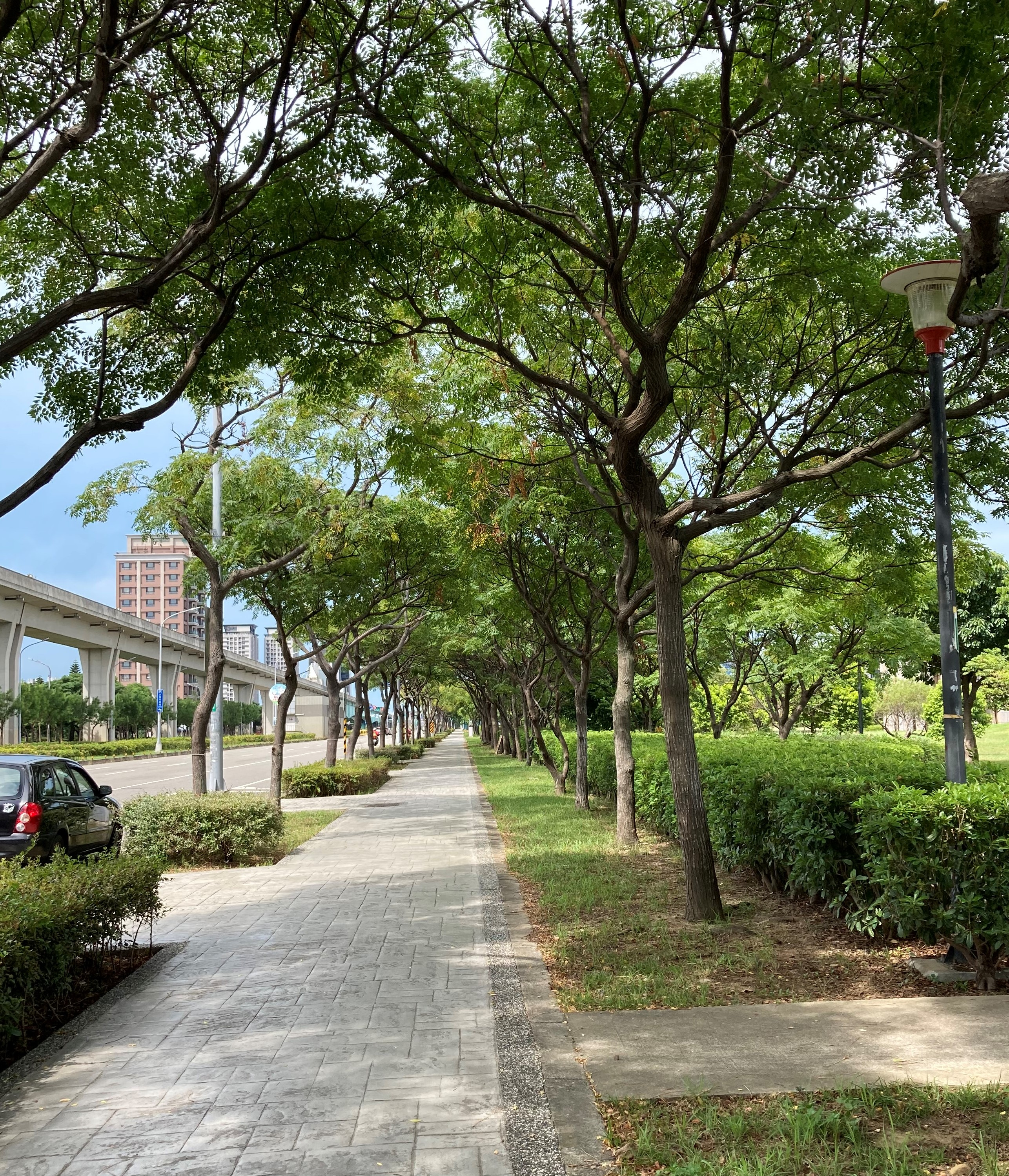 中文（台灣）: 中壢青埔街景